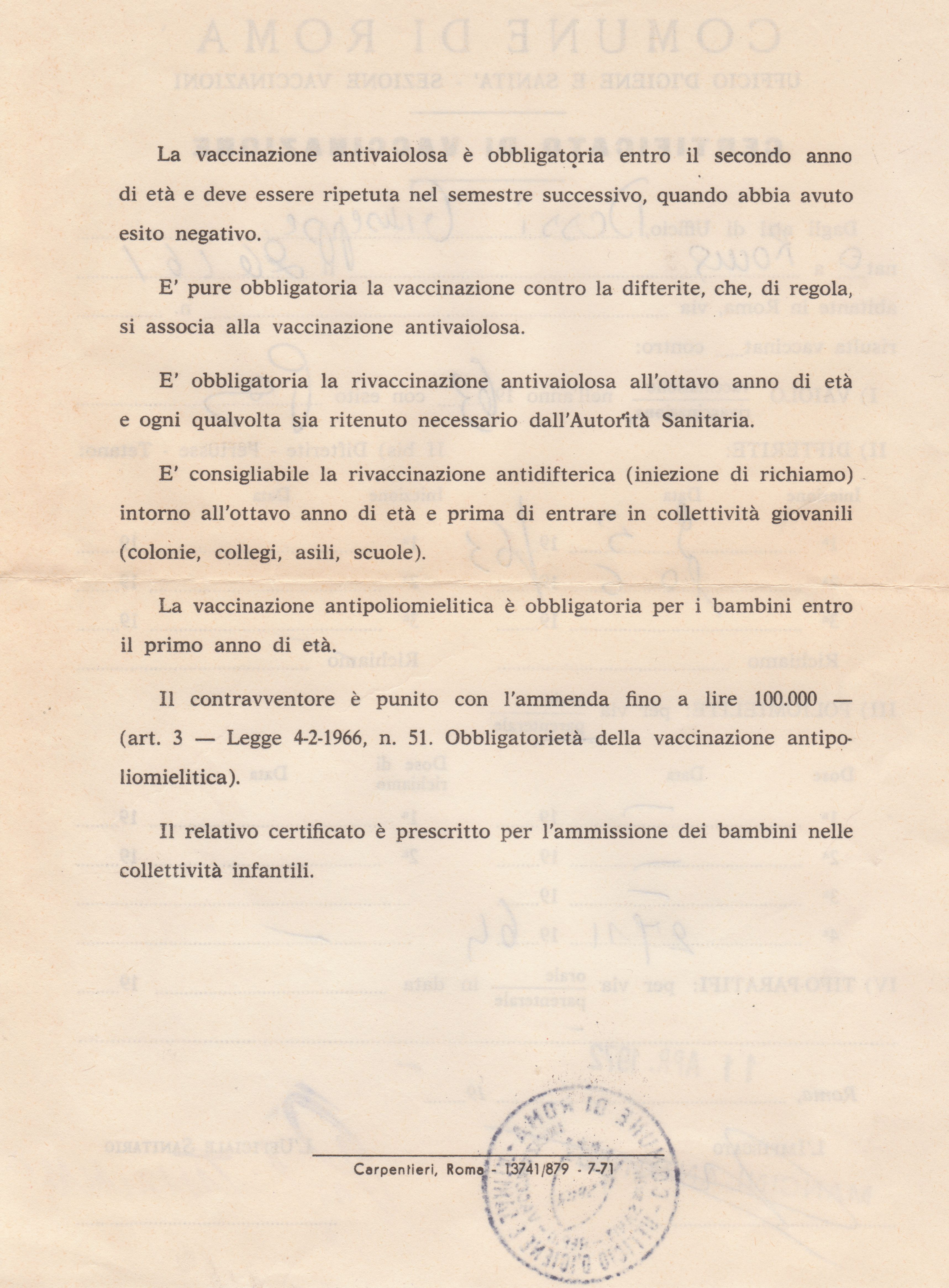 Obbligo della vaccinazione antivaiolosa in auge fino al 1981